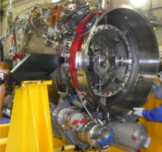 XF9-1のコアエンジン部